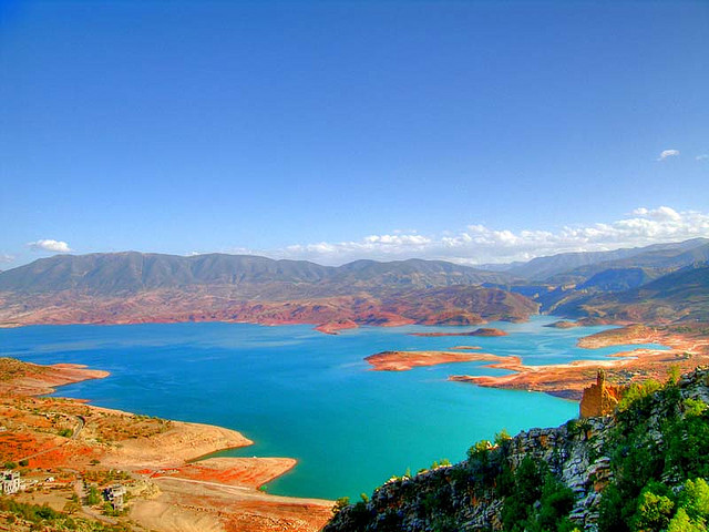 Morocco01